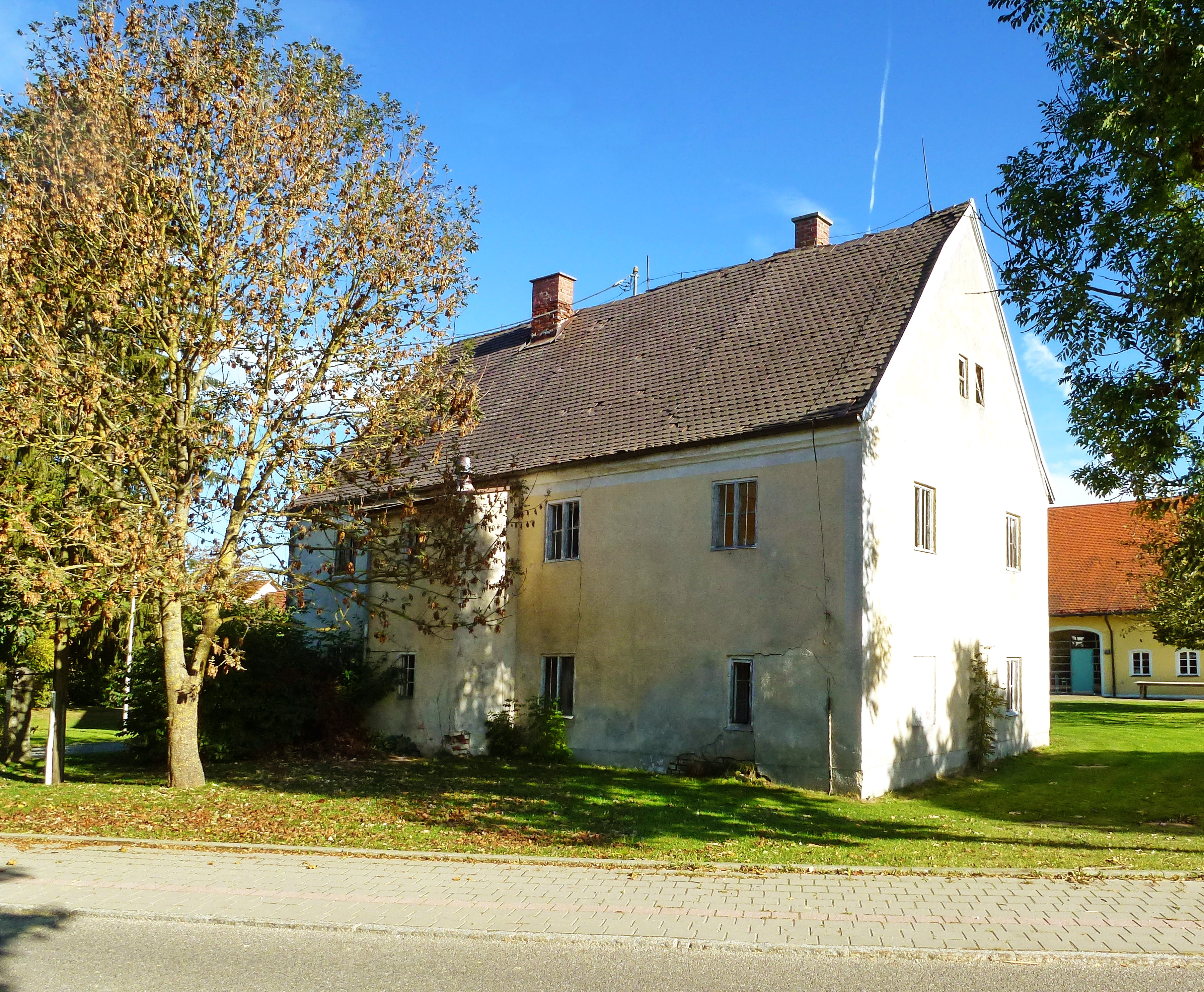 Ebertshausen (Lkr. Dachau), St-Benedikt-Str. 20: Ehemaliges Pfarrhaus. Ansicht von Westen